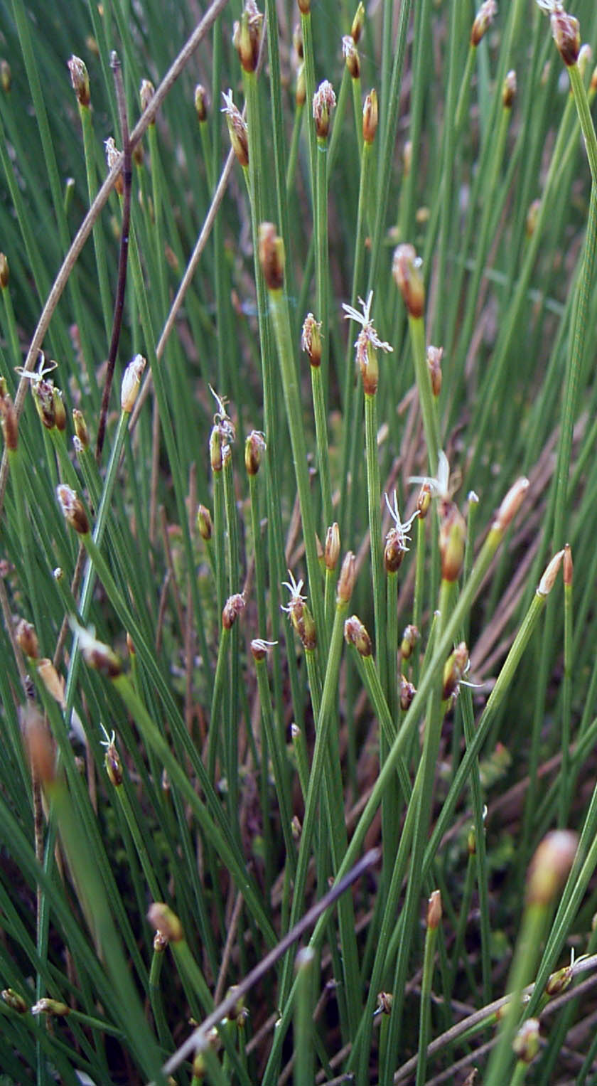 Blütenstände der Deutschen Rasenbinse (Trichophorum cespitosum subsp. germanicum) in einem Hochmoor-Rest in Nordwestdeutschland